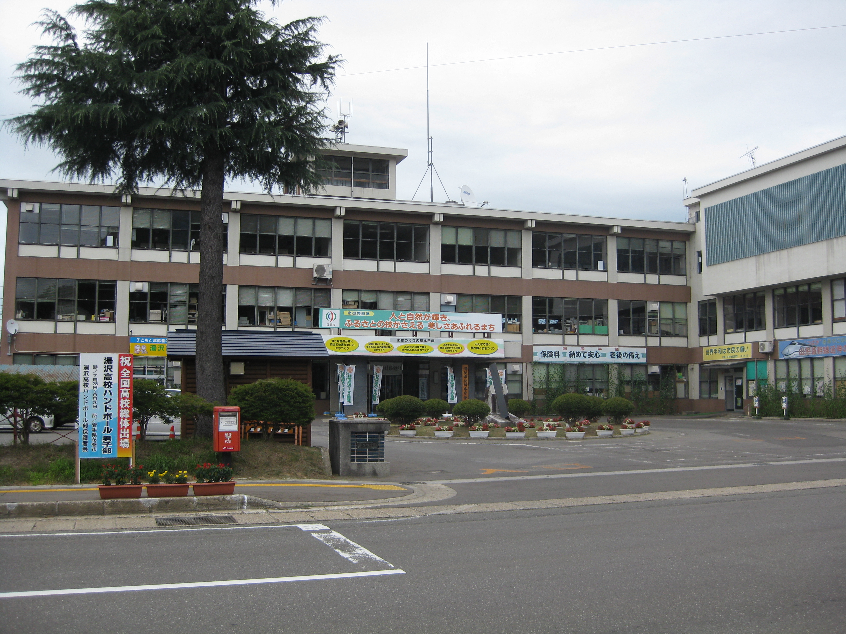 湯沢市役所